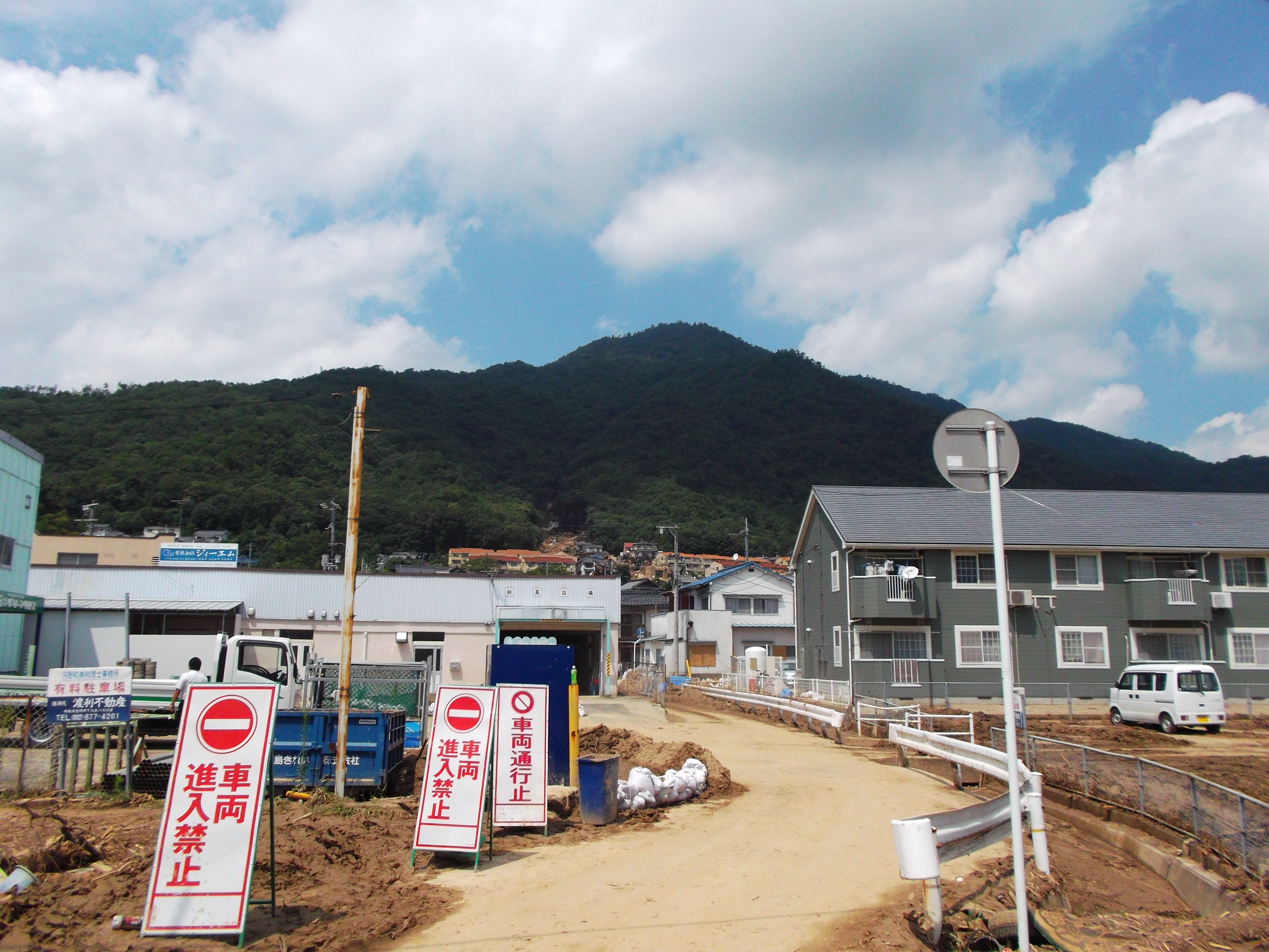 2014年8月の広島の豪雨被害（八木地区）